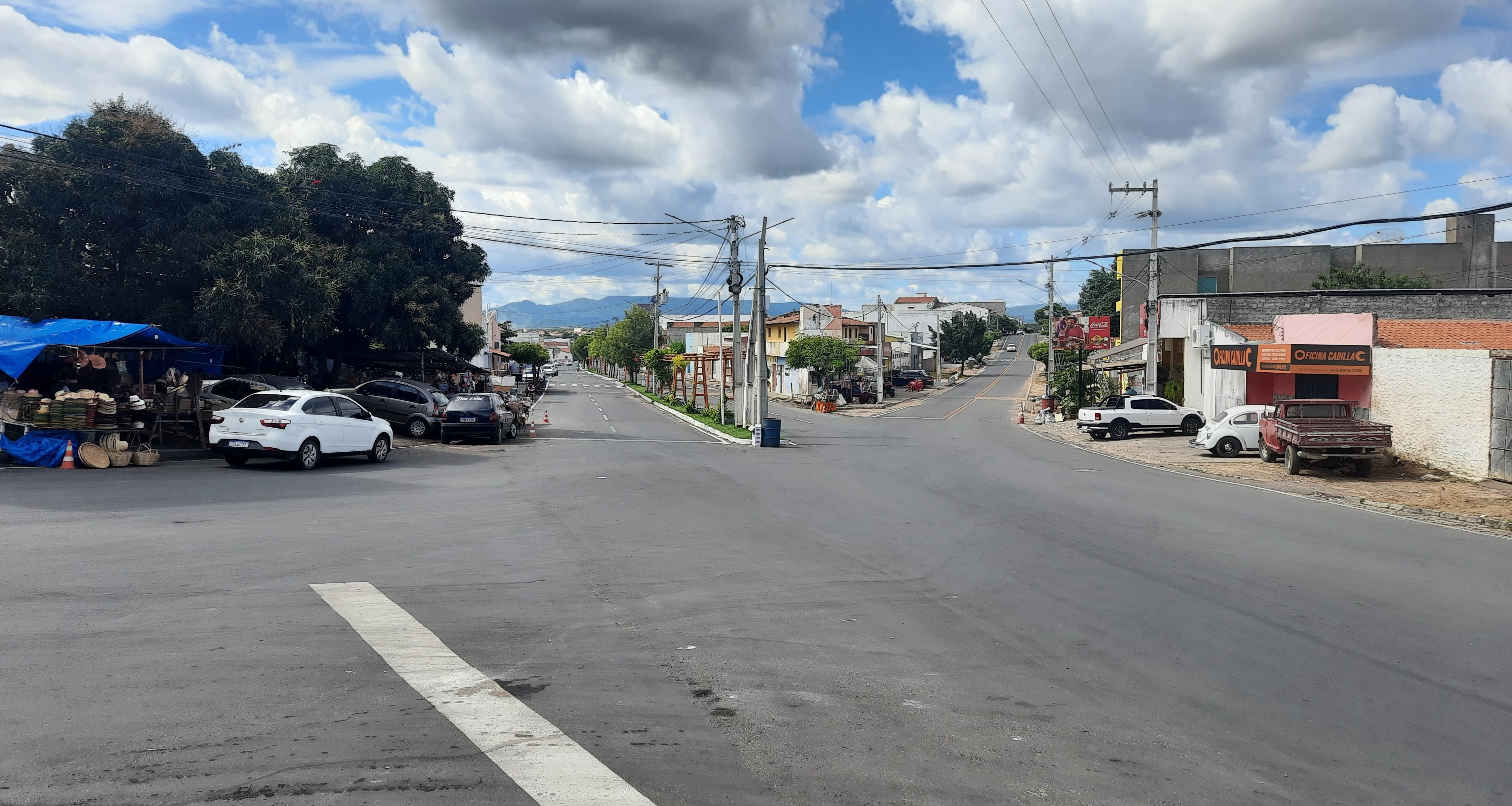 Avenida Senador Dinarte Mariz (esquerda) e Rua São João (direita), no bairro São Benedito em Pau dos Ferros, Rio Grande do Norte (Brasil).